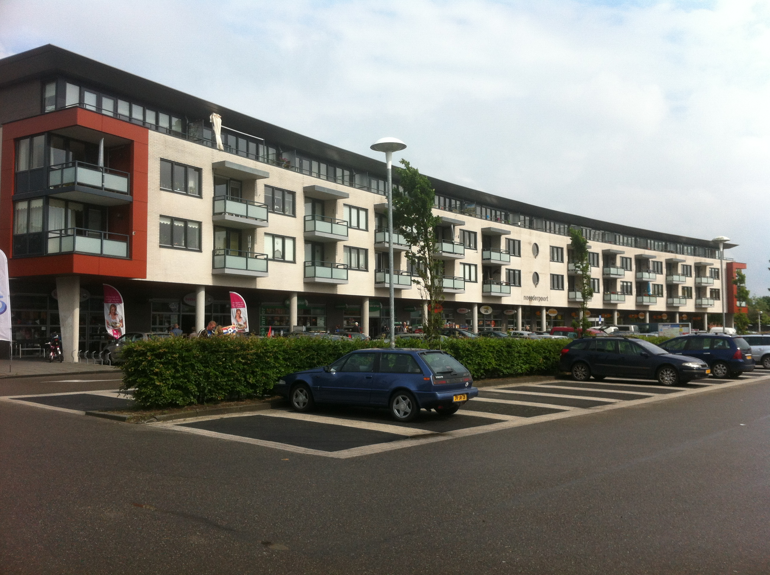 Winkelcentrum Noorderpoort in Drachten